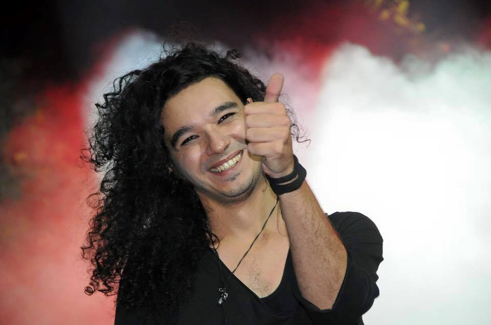 Sa koncerta